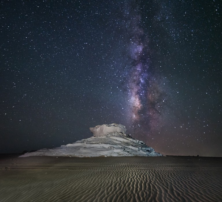 مجرة درب التبانة كا تم رصدها في الصحراء البيضاء